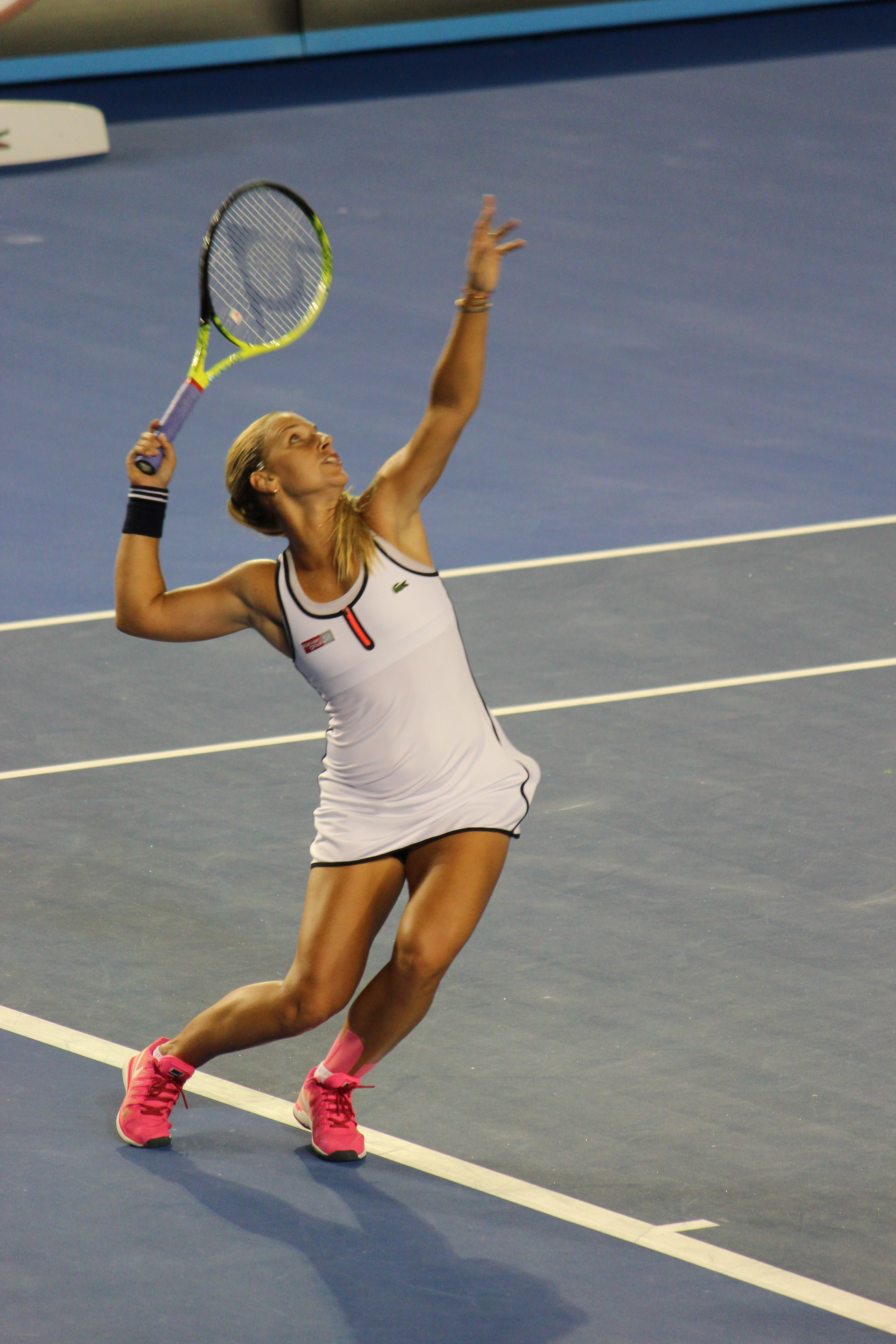 Dominika Cibulková